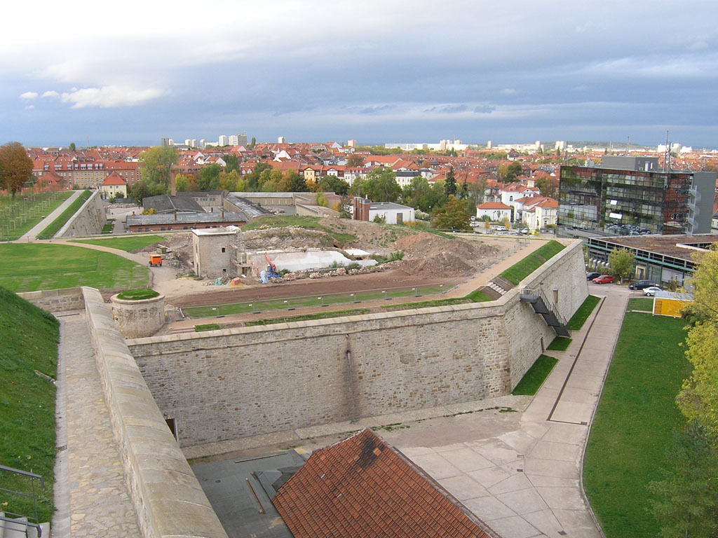 Treppenturm (errichtet 1828) und Kriegspulvermagazin Nr.1 (errichtet 1820) auf der Bastion Franz (errichtet 1680) der Zitadelle Petersberg